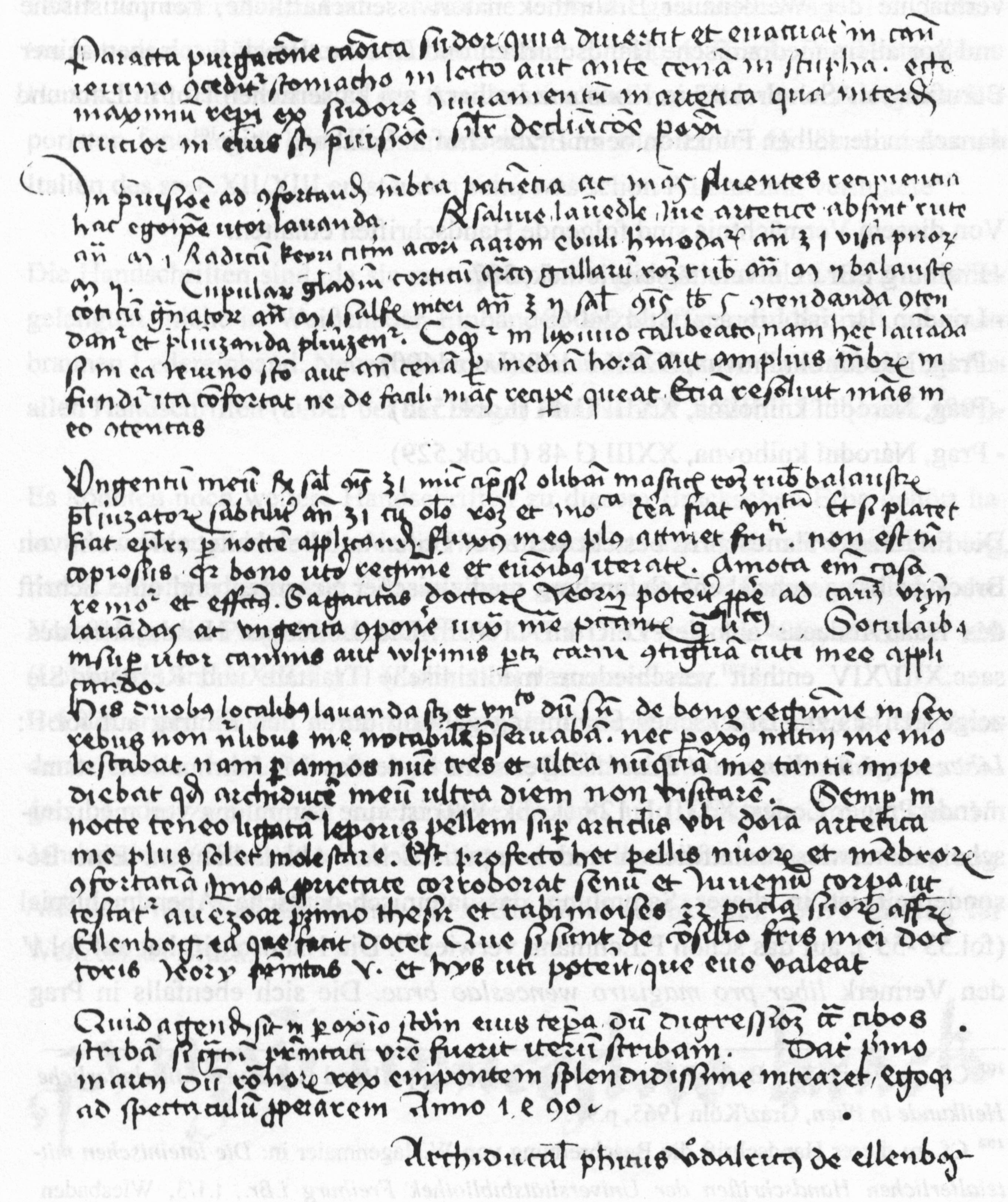 Prag, Národní knihova, XXIII C 119 (Lobkowitz 418, ehemals Kloster Weißenau), fol. 1v, medizinische Abhandlung Ulrich Ellenbogs, datiert 1490